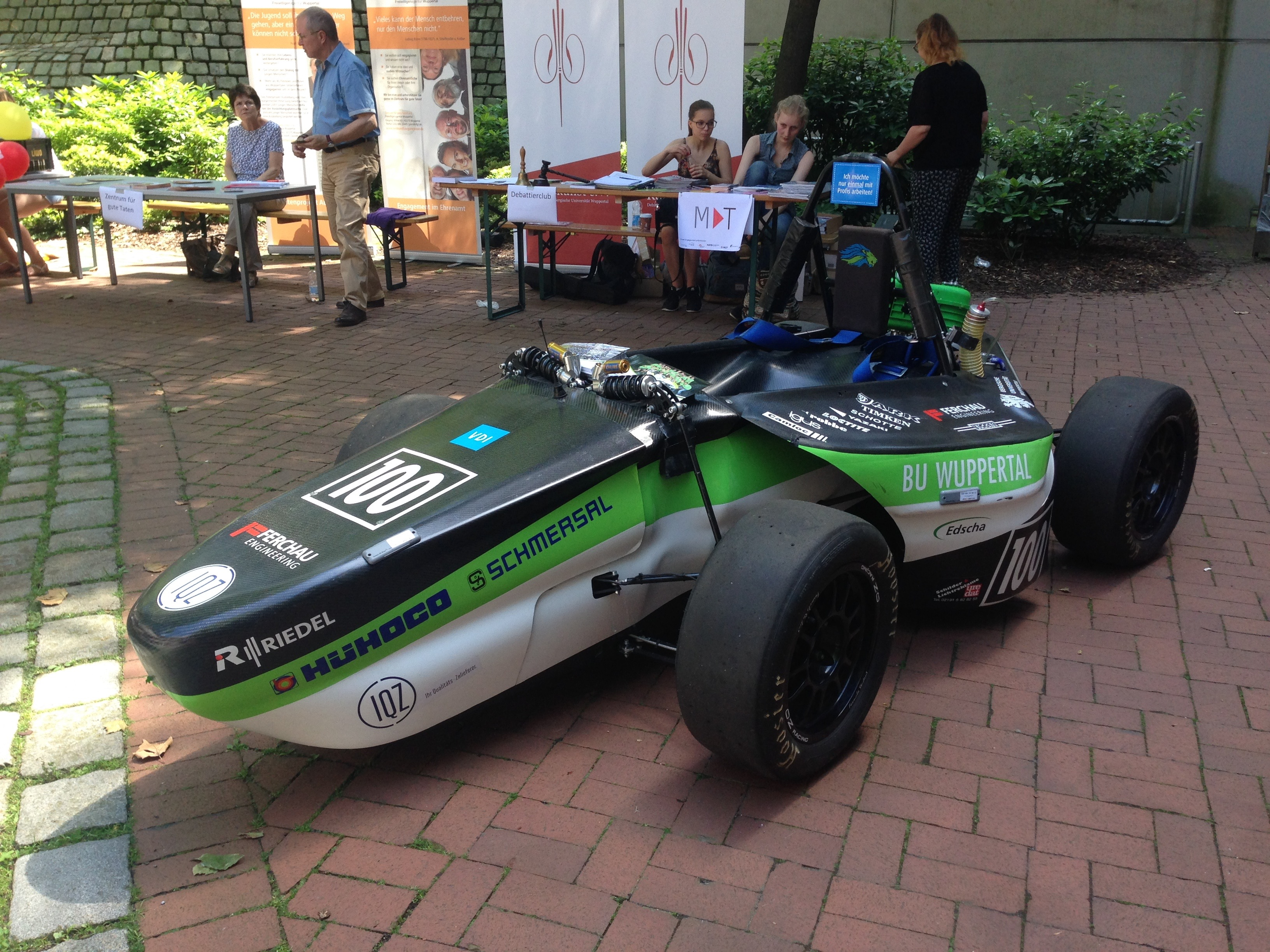 Rennwagen des Teams GreenLion Racing der Uni Wuppertal